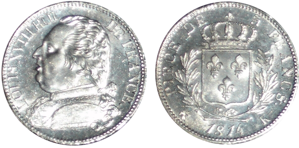 Pièce de 5 francs émise sous Louis XVIII en 1814